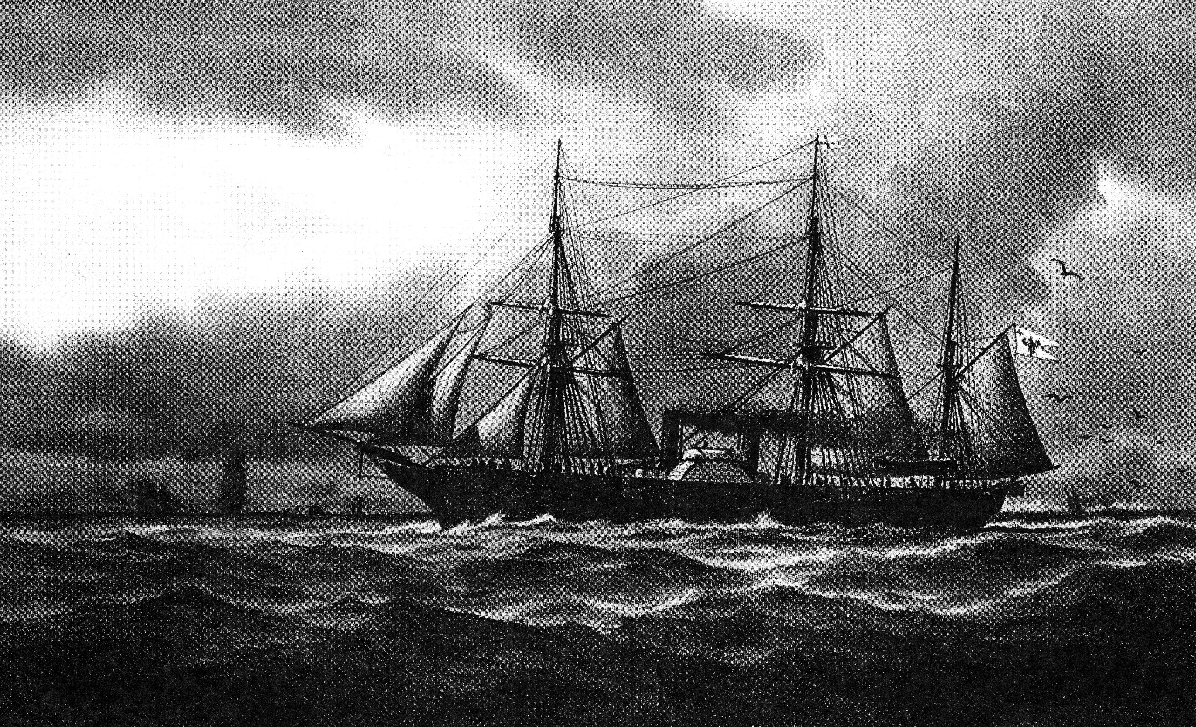 Preussische Radkorvette SMS DANZIG 1855. Gemälde von Lüder Arenhold 1891